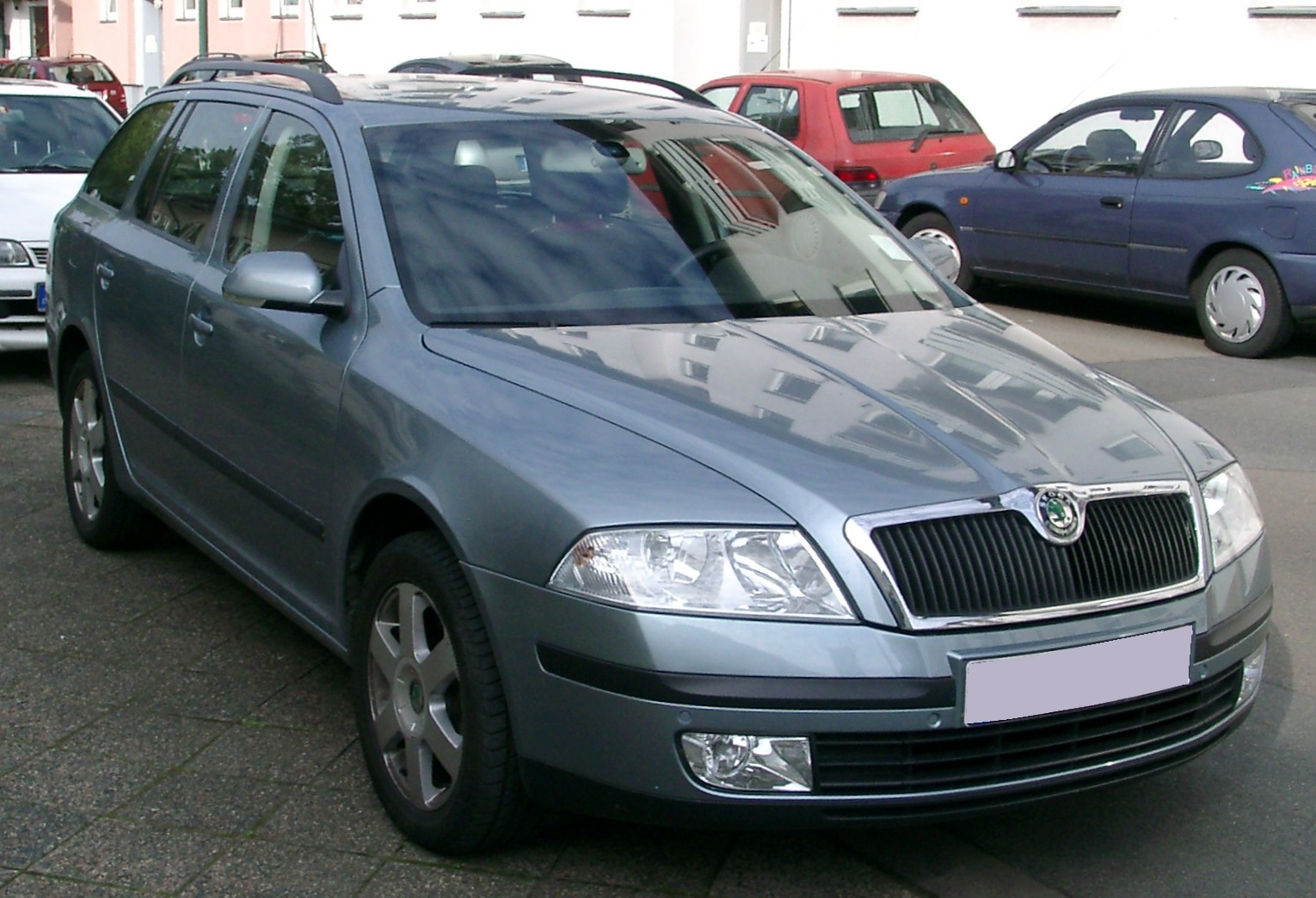 Škoda Octavia Combi, 2. Generation